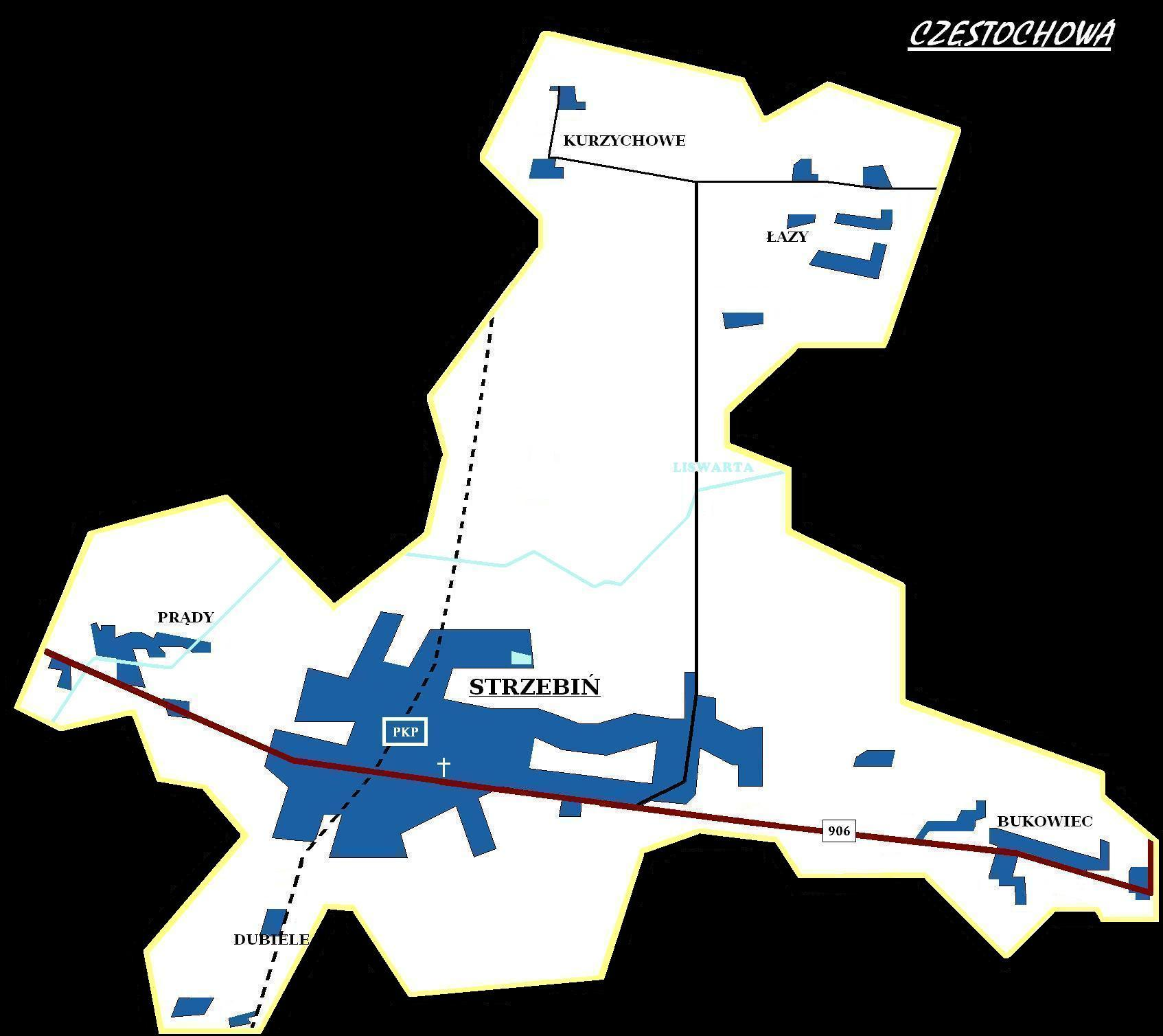 Mapa sołectwa Strzebiń (Gmina Koszęcin)